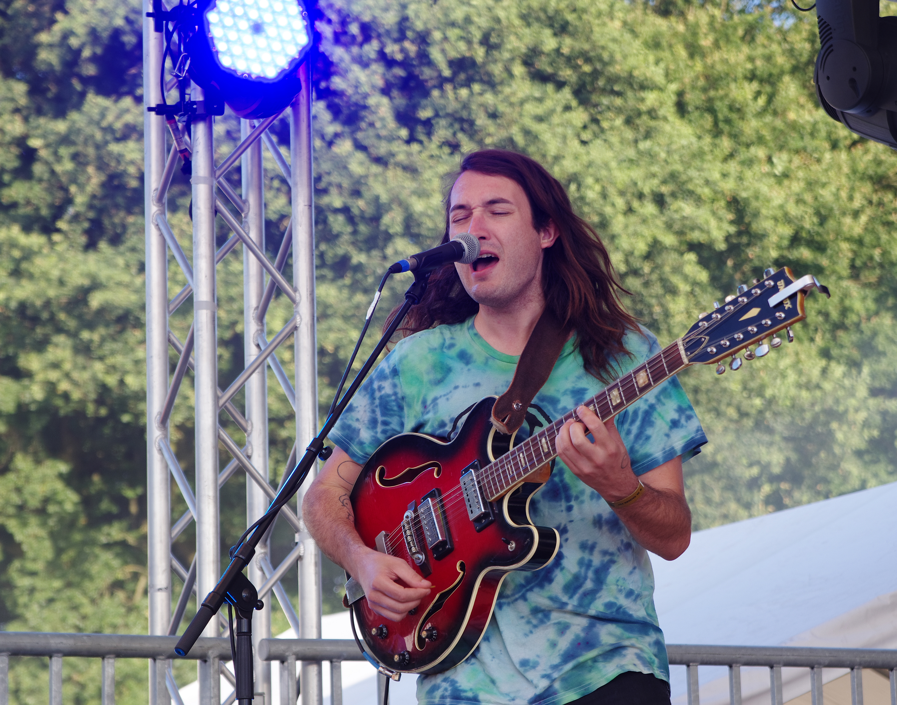 Mikal Cronin auf dem 30. Haldern Pop Festival 2013